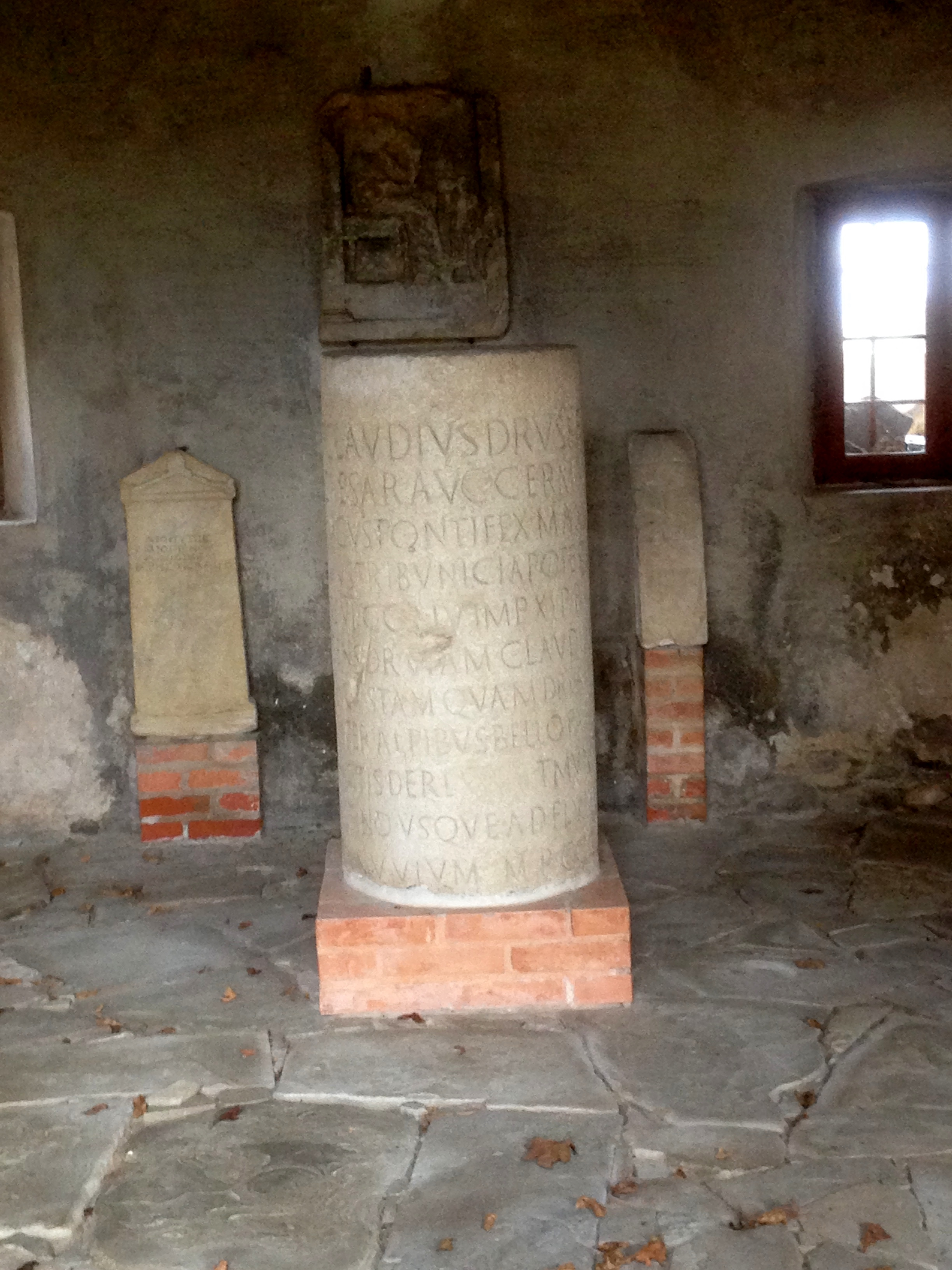 Cippo miliare ritrovato a Cesiomaggiore nel 1786, conservato nella Villa Tauro in località Centenère. CIL V 8002: Ti(berius) Claudius Drusi f(ilius) / Caesar Aug(ustus) Germa/nicus pontifex max /mus tribunicia potesta/te VI co(n)s(ul) IV imp(erator) XI p(ater) p(atriae) / censor viam Claudiam / Augustam quam Drusus / pater Alpibus bello pate/factis derex[e]rat munit ab / Altino usque ad flumen / Danuvium m(ilia) p(assuum) CCCL